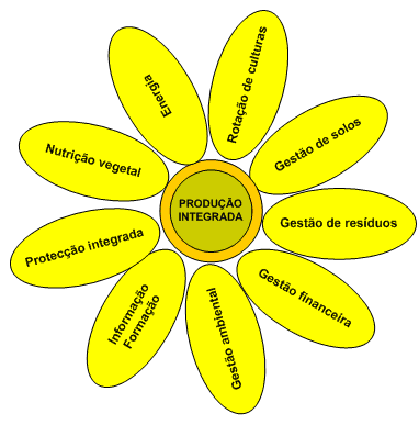 Princípios da Produção Integrada - Esquema